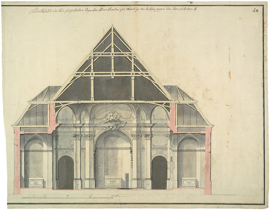 "Durchschnidt der neu herzustellen sejenden Pfarrkirchen zu Berching, dieselbige gegen den Chor zusehen ist" (Neubau der Stadtpfarrkirche Maria Himmelfahrt in Berching in der Oberpfalz). Feder in Grau, grau und rosa laviert.